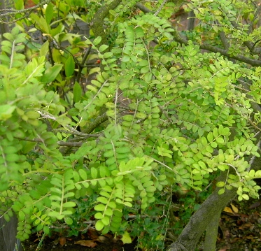 Toromiro bei Hangaroa, Rapa Nui (Osterinsel)